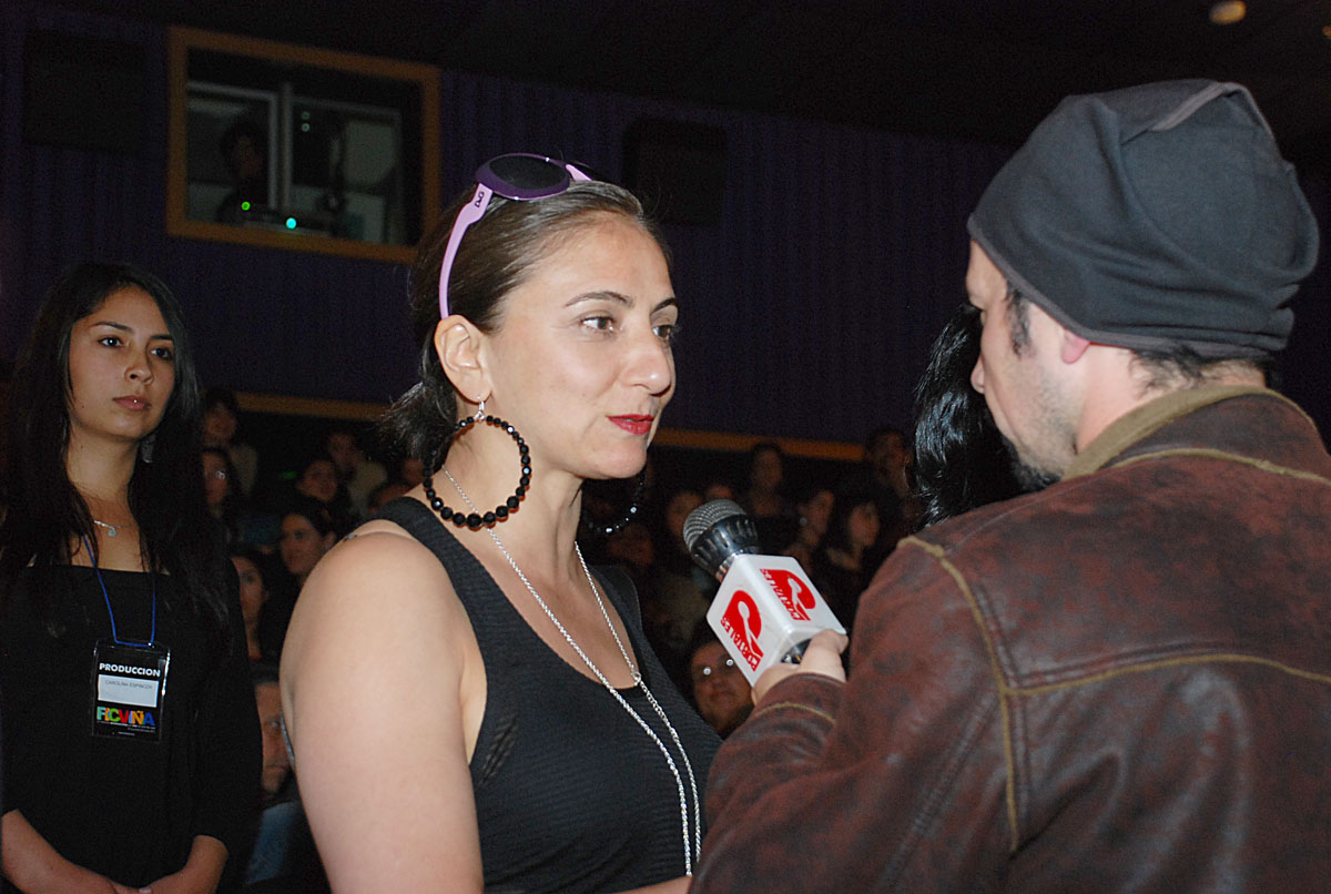 Cinemark, Pre-estreno película Bombal